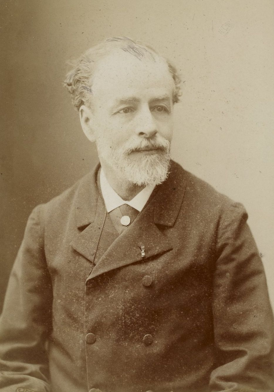 Charles Henri Durier par Eugène Pirou